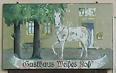 Radebeul, Wirtshausschild vom Gasthof „Weißes Roß“